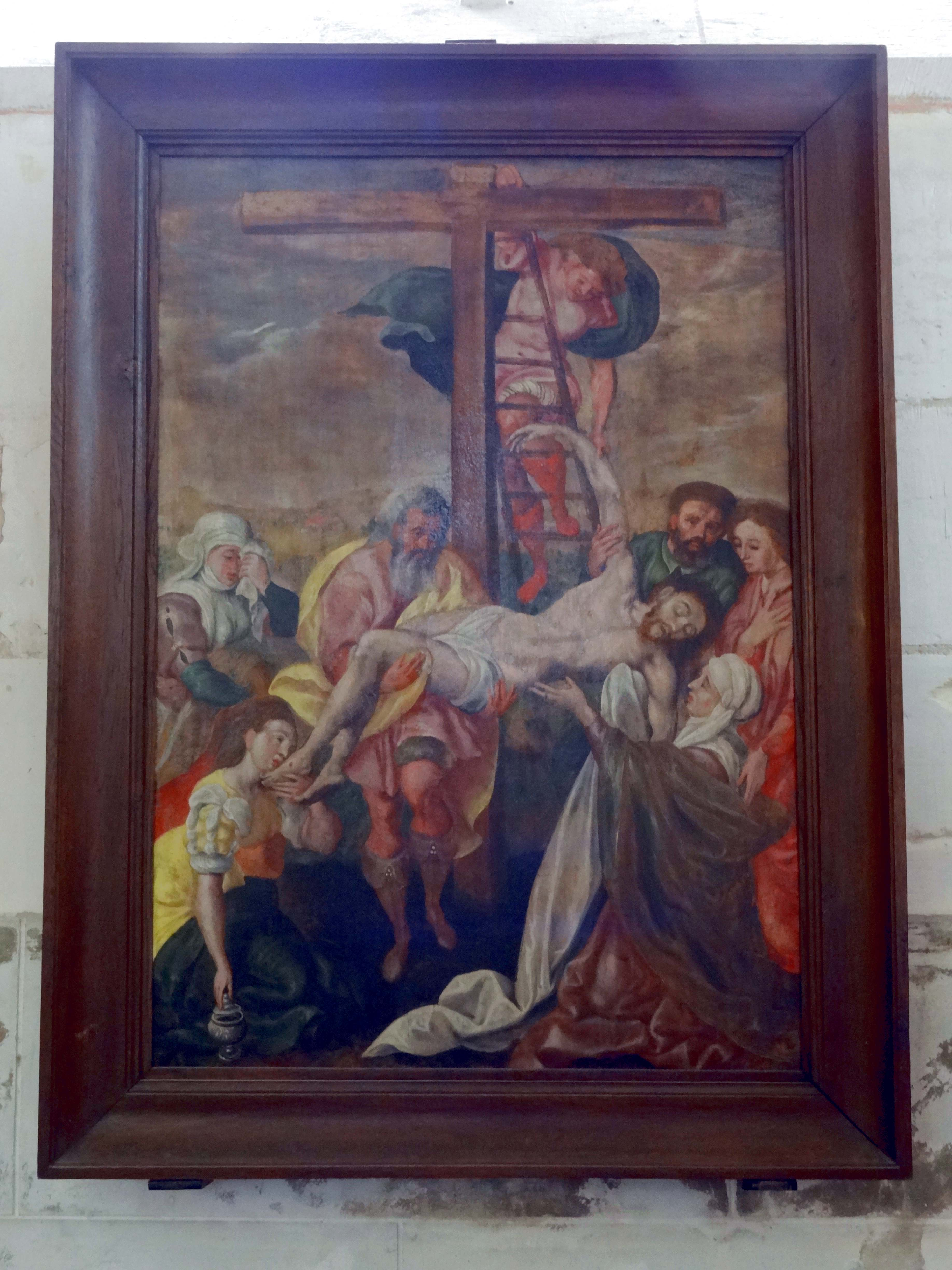 Tableau - Descente de croix, 2e moitié XVIe siècle.